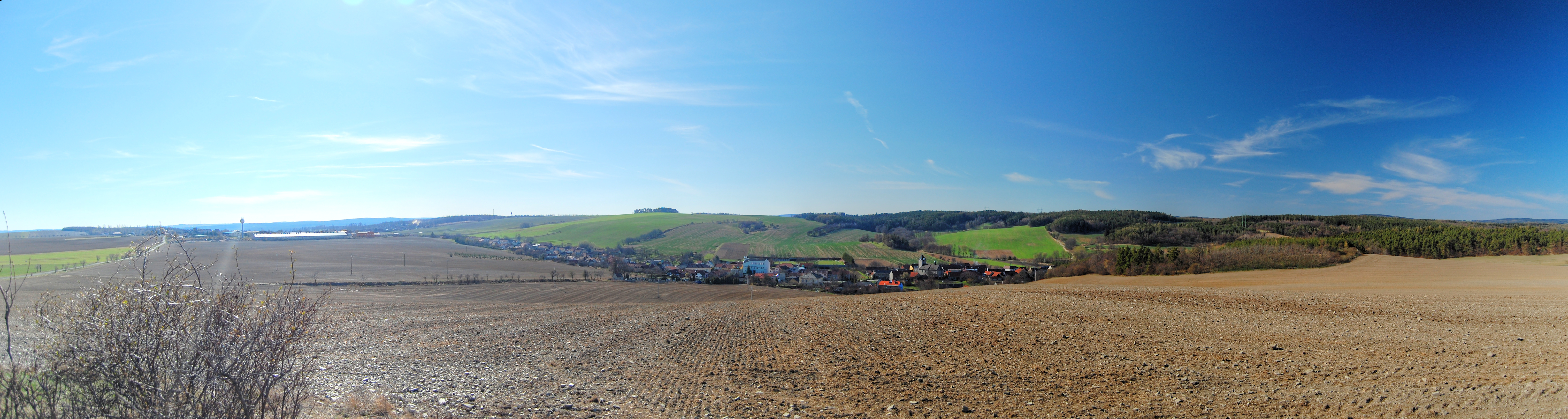 Panoramatický pohled na obec Přemyslovice, okres Prostějov